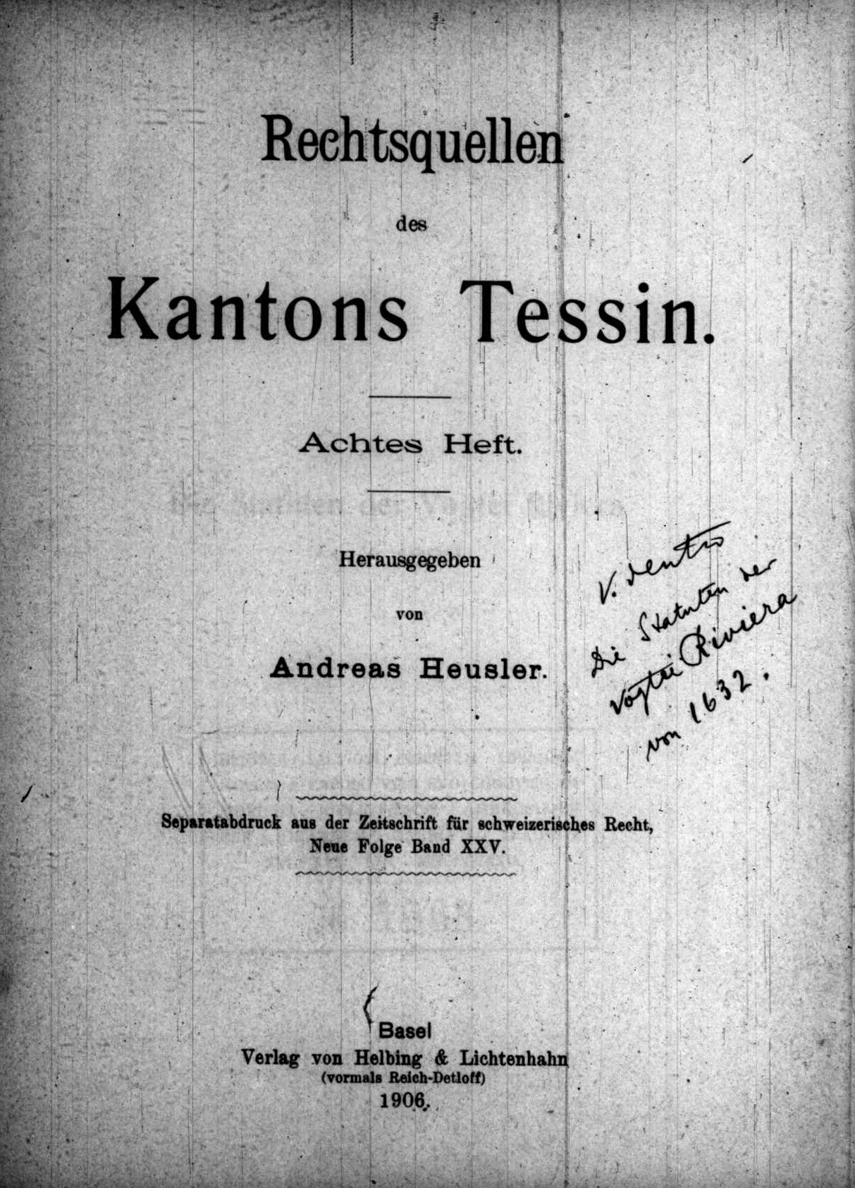 Frontespizio